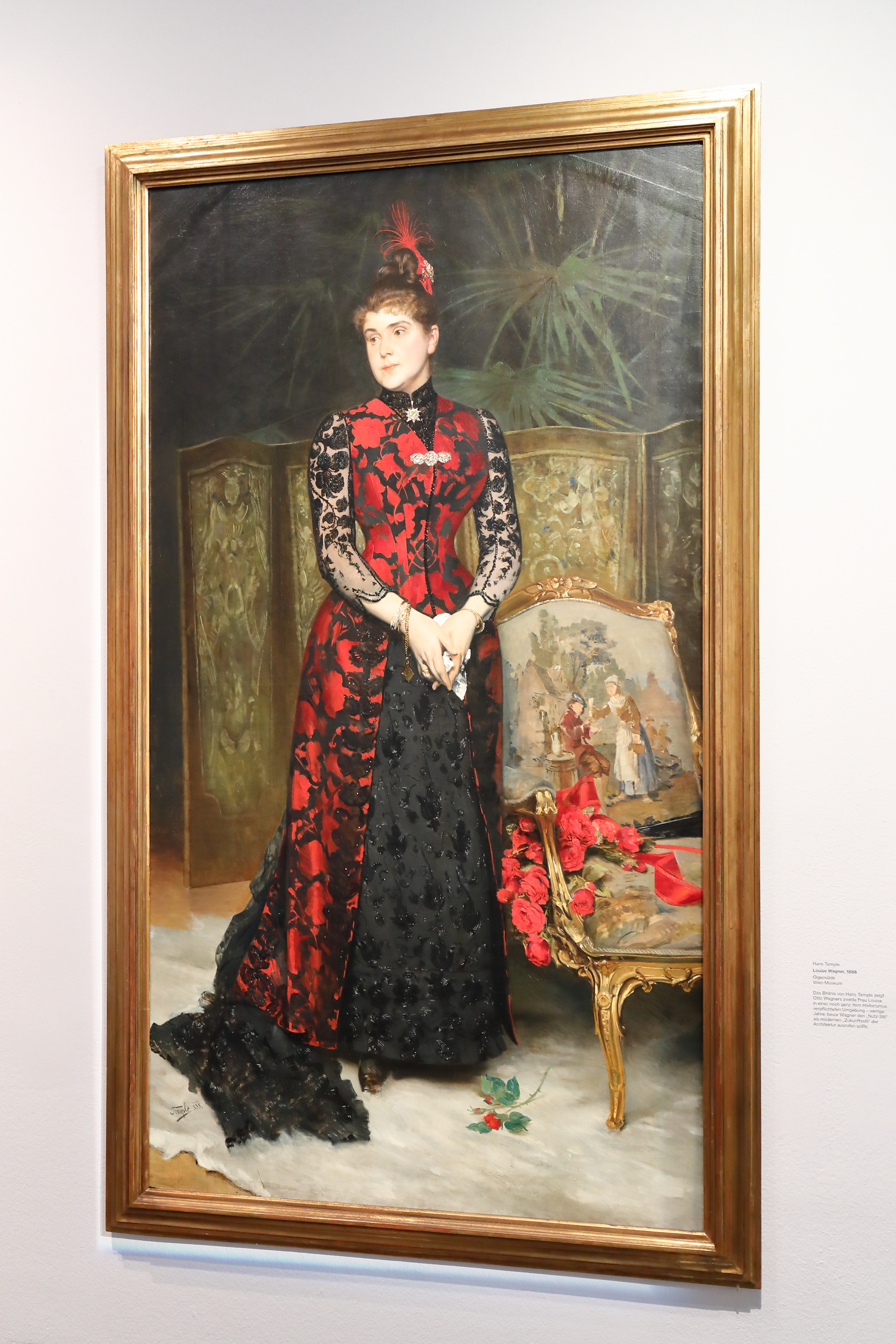 Porträt von Louise (Luisa) Wagner (1859–1915), geborene Aloisia Josefa Anna Stiffel und 2. Ehefrau von Otto Wagner. Das Bildnis schuf der Genre- und Porträtmaler Hans Temple 1888 und zeigt die Porträtierte in einer noch ganz dem Historismus verpflichteten Umgebung.